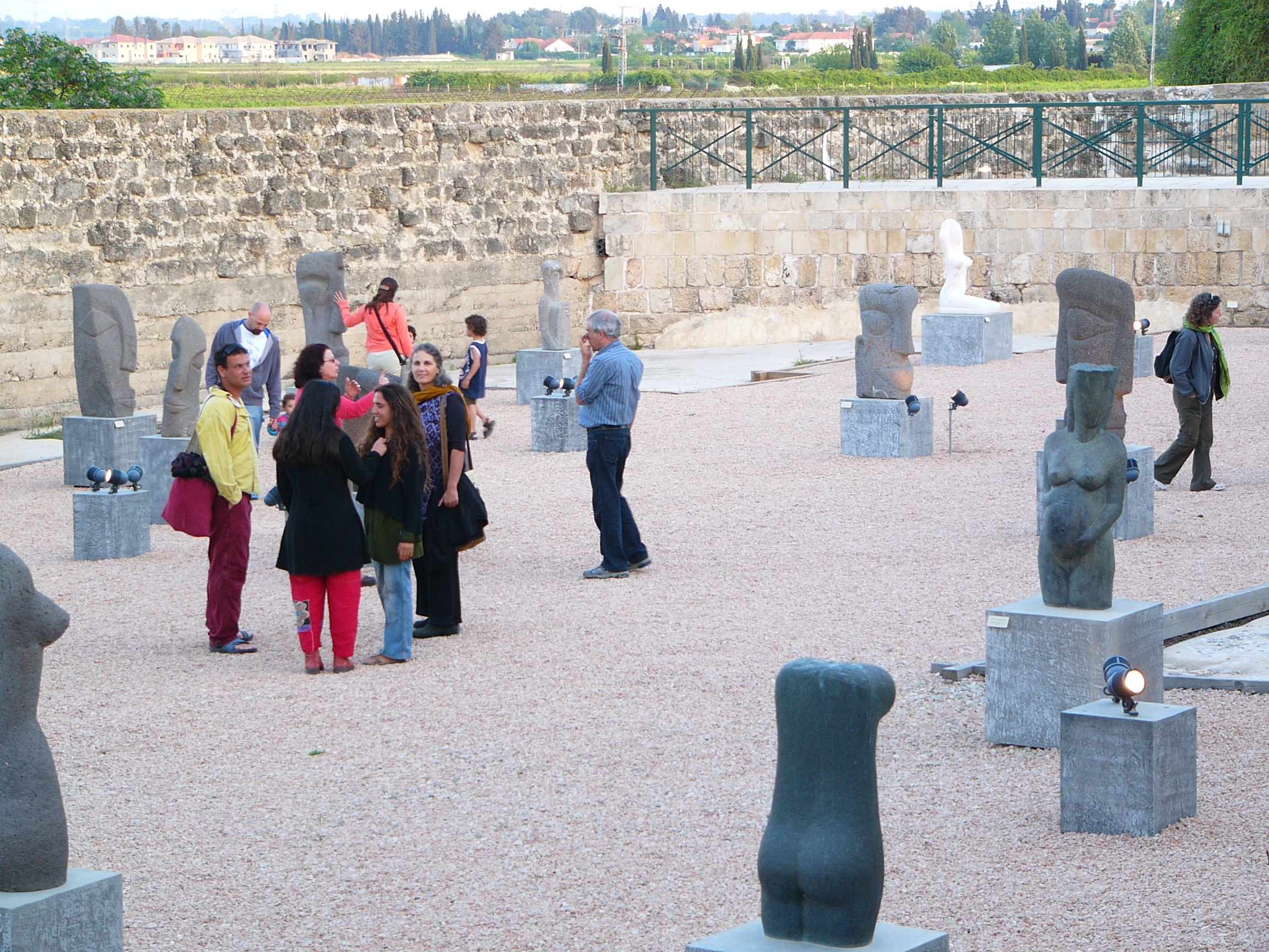 Espaces extérieurs d'exposition du Musée Achiam à Shuni (Israël)